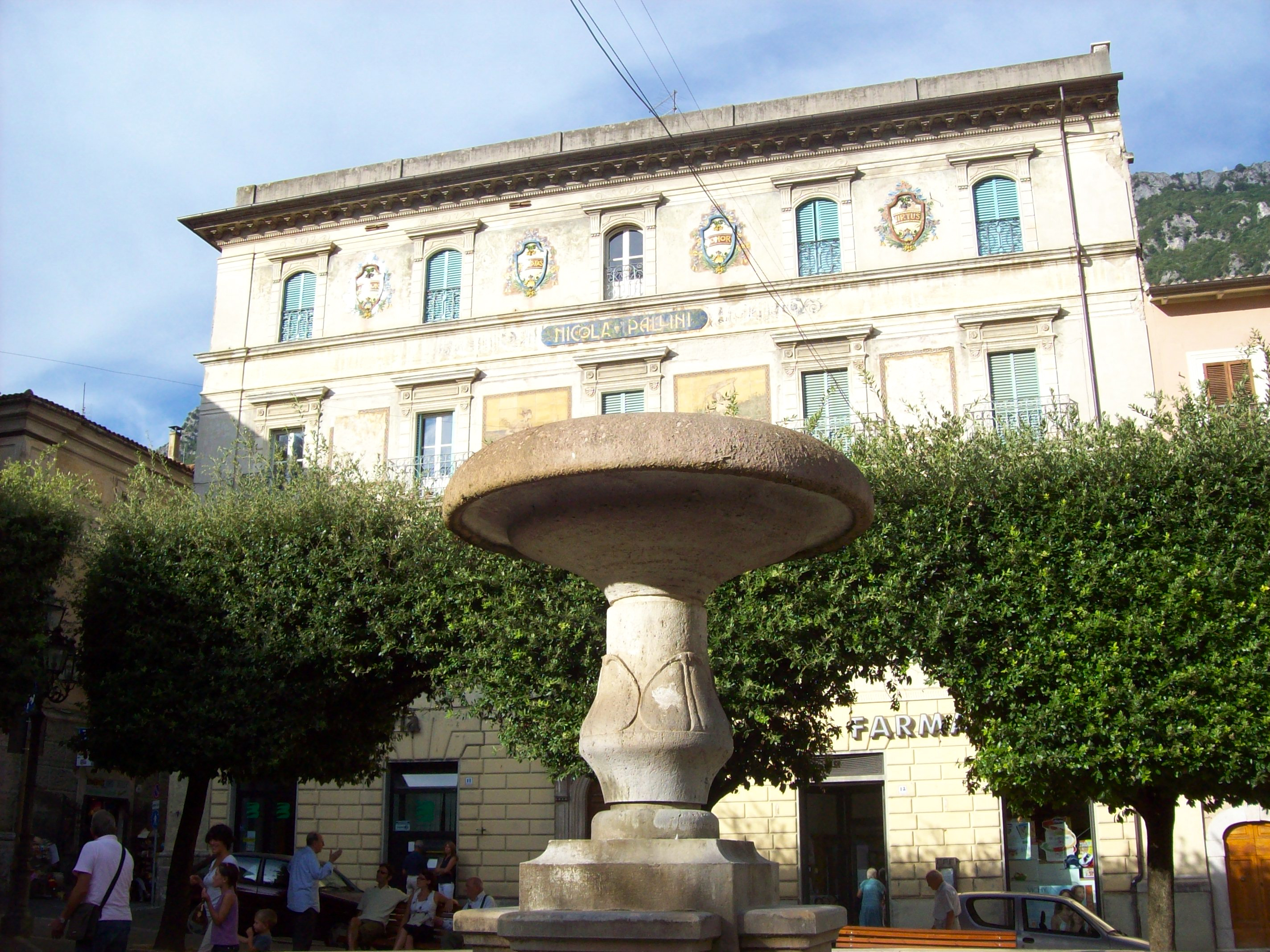 Antrodoco (Lazio)